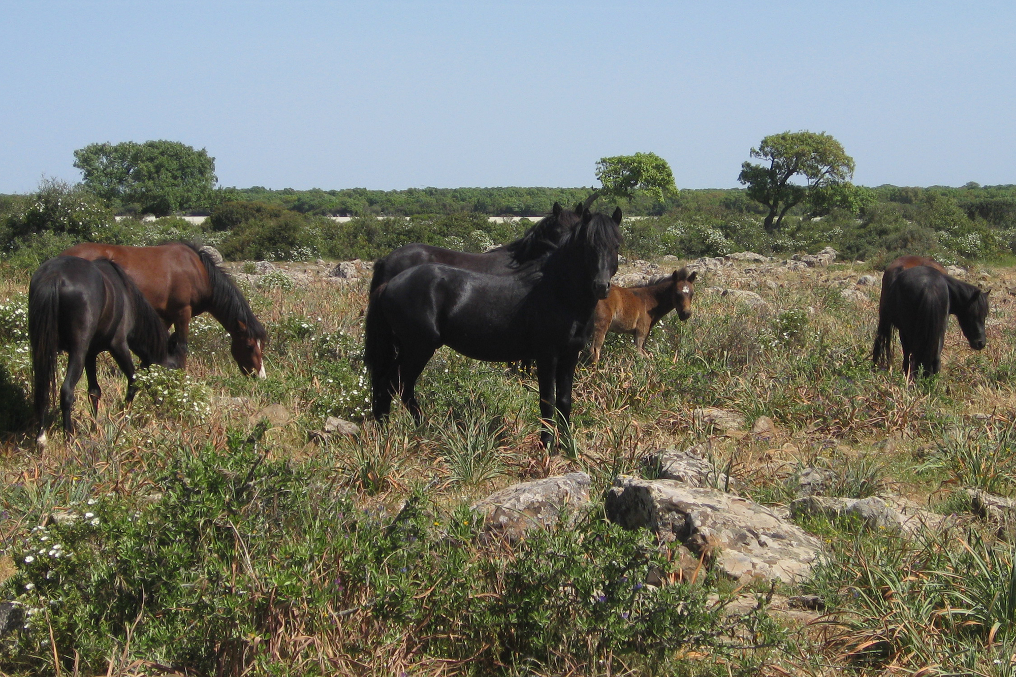 Verwilderte Kleinpferderasse (Giara-Pferd) in der Giara di Gesturi auf Sardinien